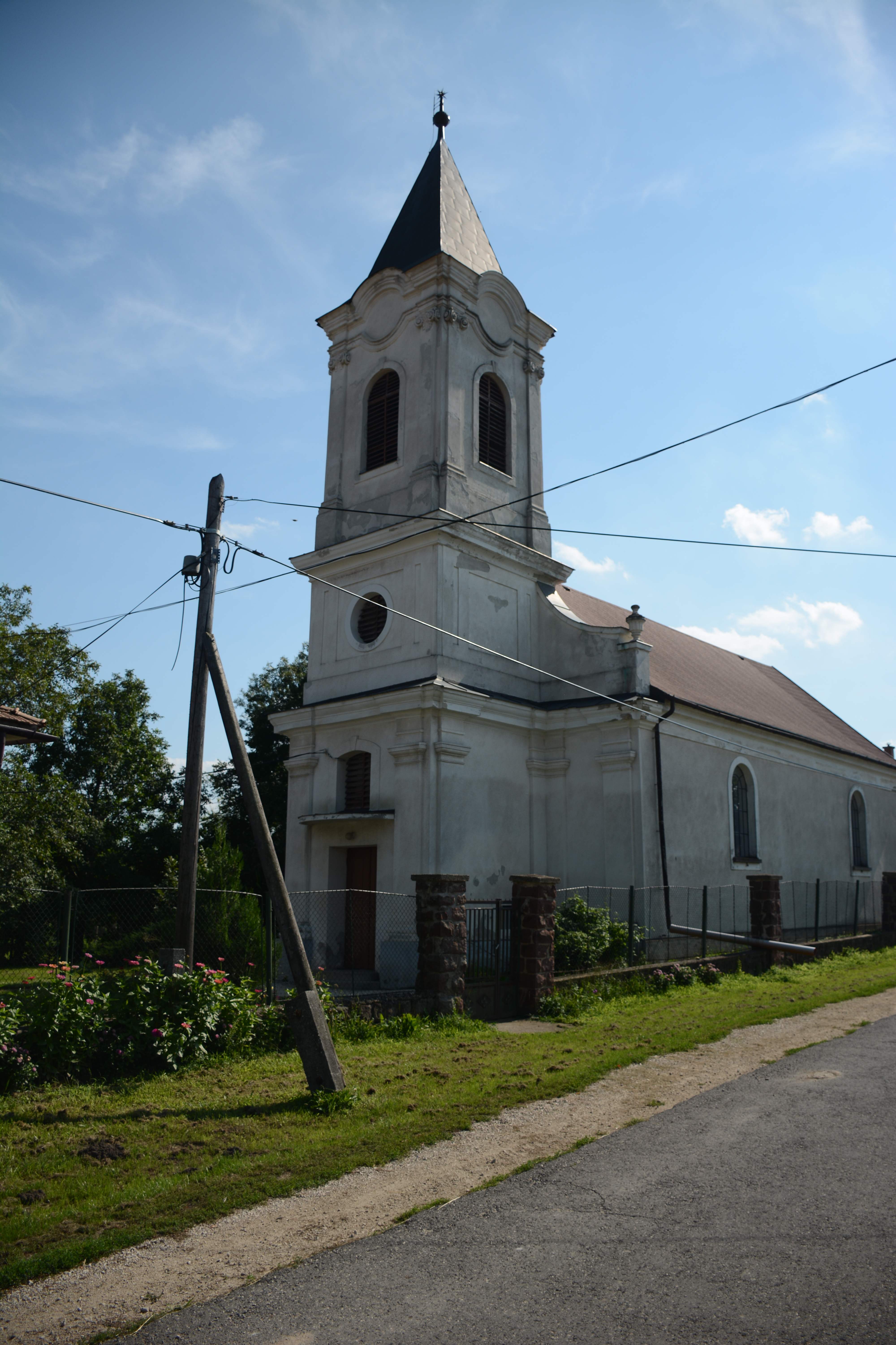 templom, csősz